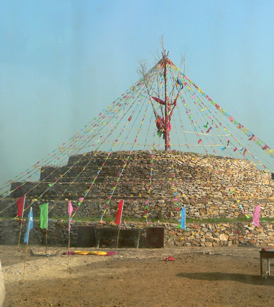 敖包